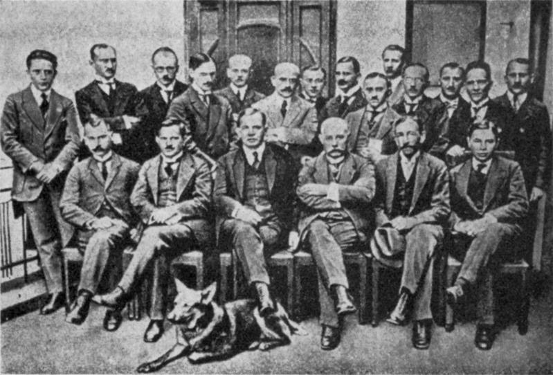 Członkowie Polskiego Komisariatu Plebiscytowego, Members of Polish Commitee for Plebiscite in Upper Silesia 1921